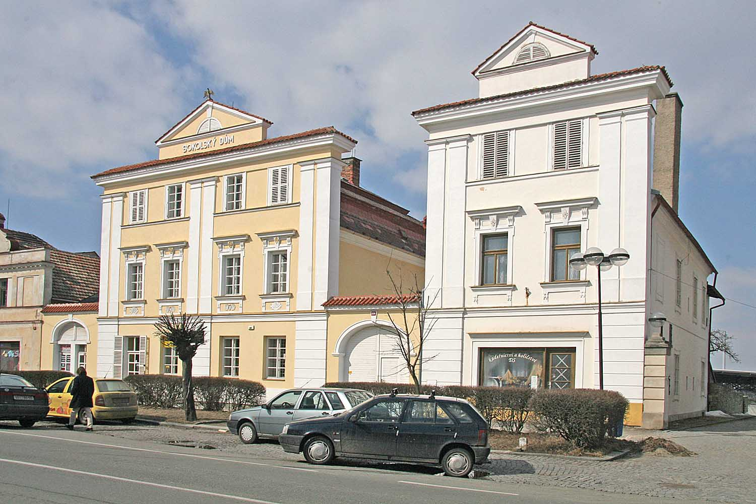 Městský dům (Opočno), Kupkovo nám. 134, Opočno autor: Prazak date: 23. 3. 2006